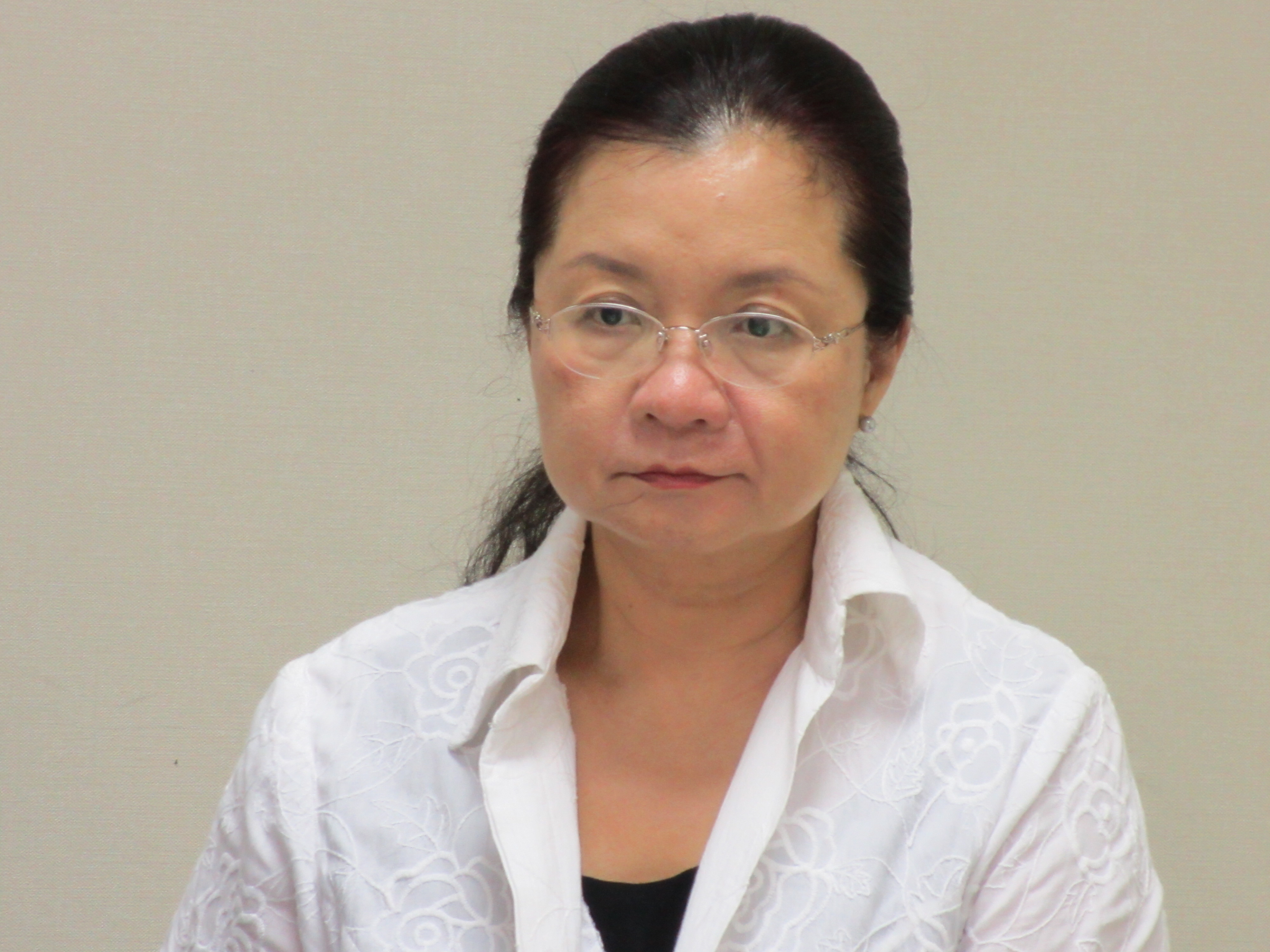 民主進步黨籍立法委員田秋堇